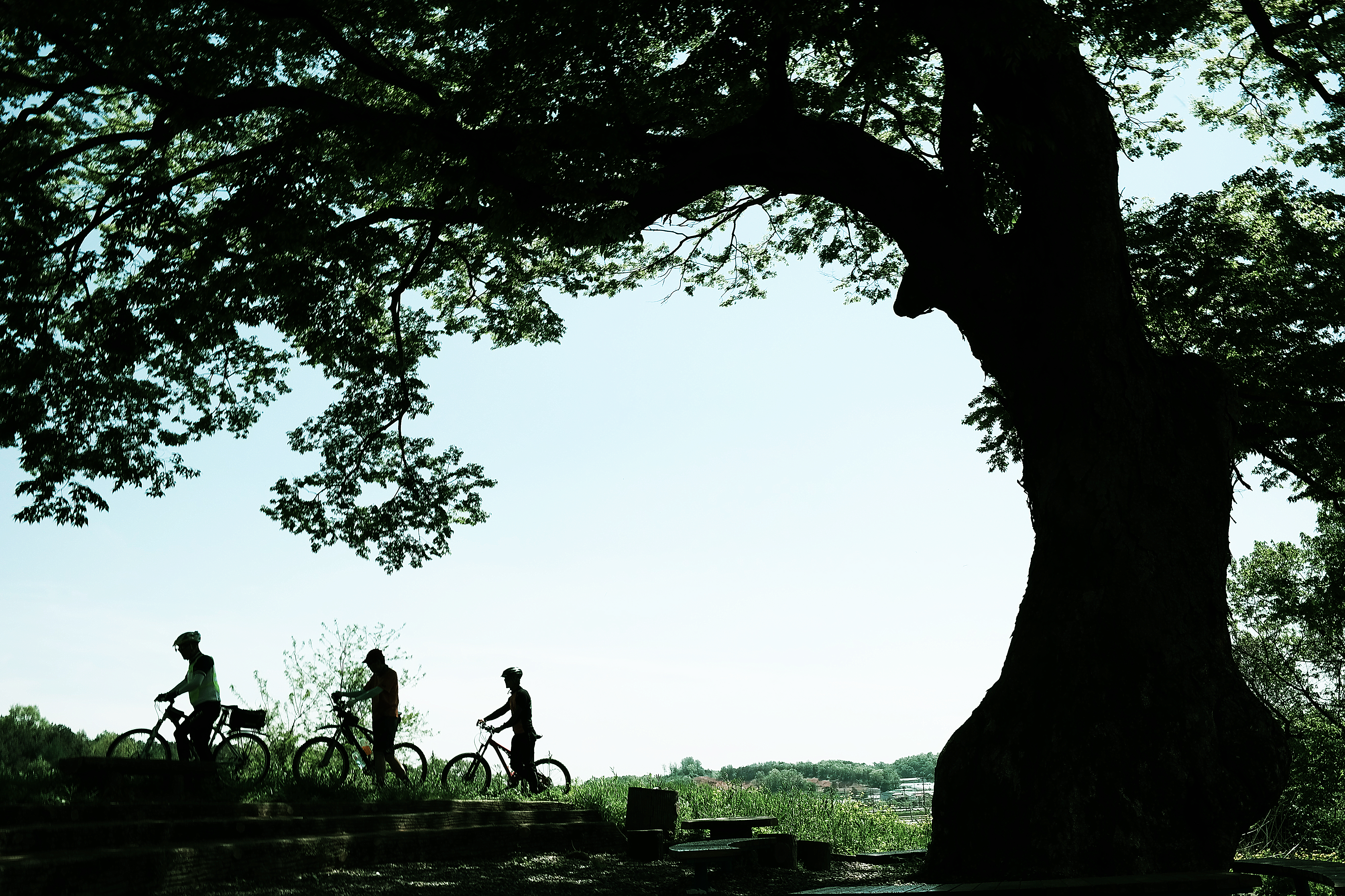 문산가는 길에선 4백년수령의 느티나무